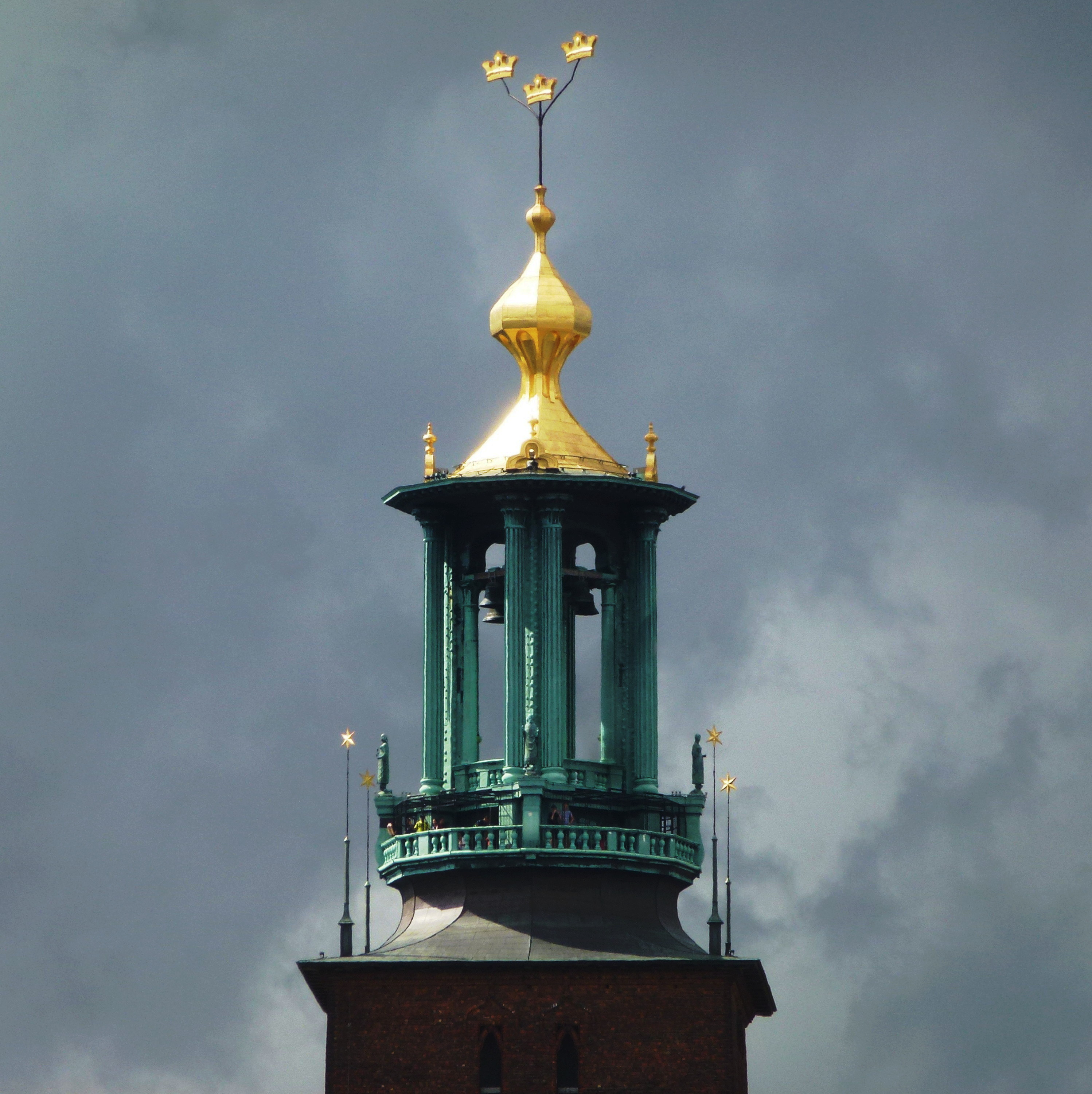 Stockholms stadshus, tornet med åskmoln